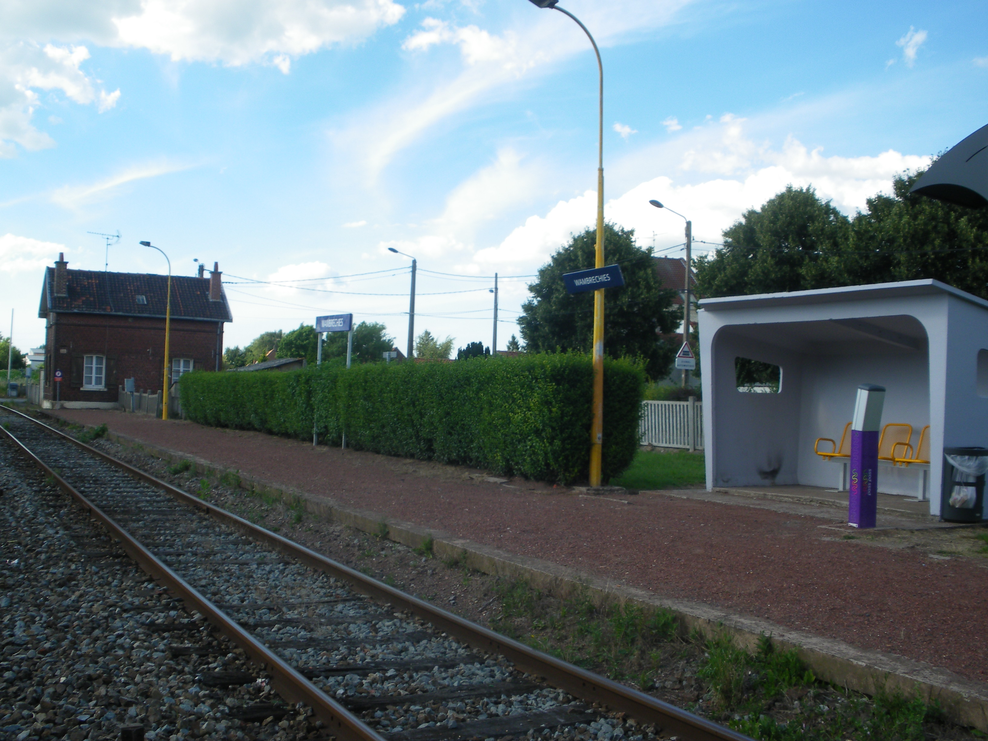 Vue de l'arrêt ferroviaire de Wambrechies.